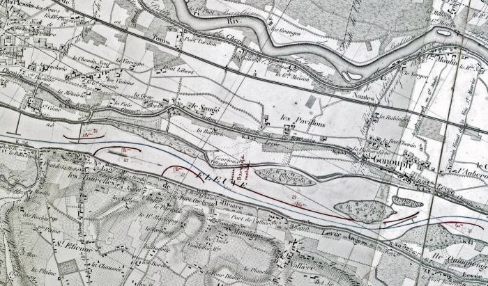 Les aménagements portuaires de la Loire au niveau de la commune de Fondettes, en Indre-et-Loire. Extrait de la carte de la Loire réalisée par l'ingénieur Coumes en 1848, puis complétée en 1858 par l'ingénieur Collin. (archives départementales du Loiret, Liasse 30936).